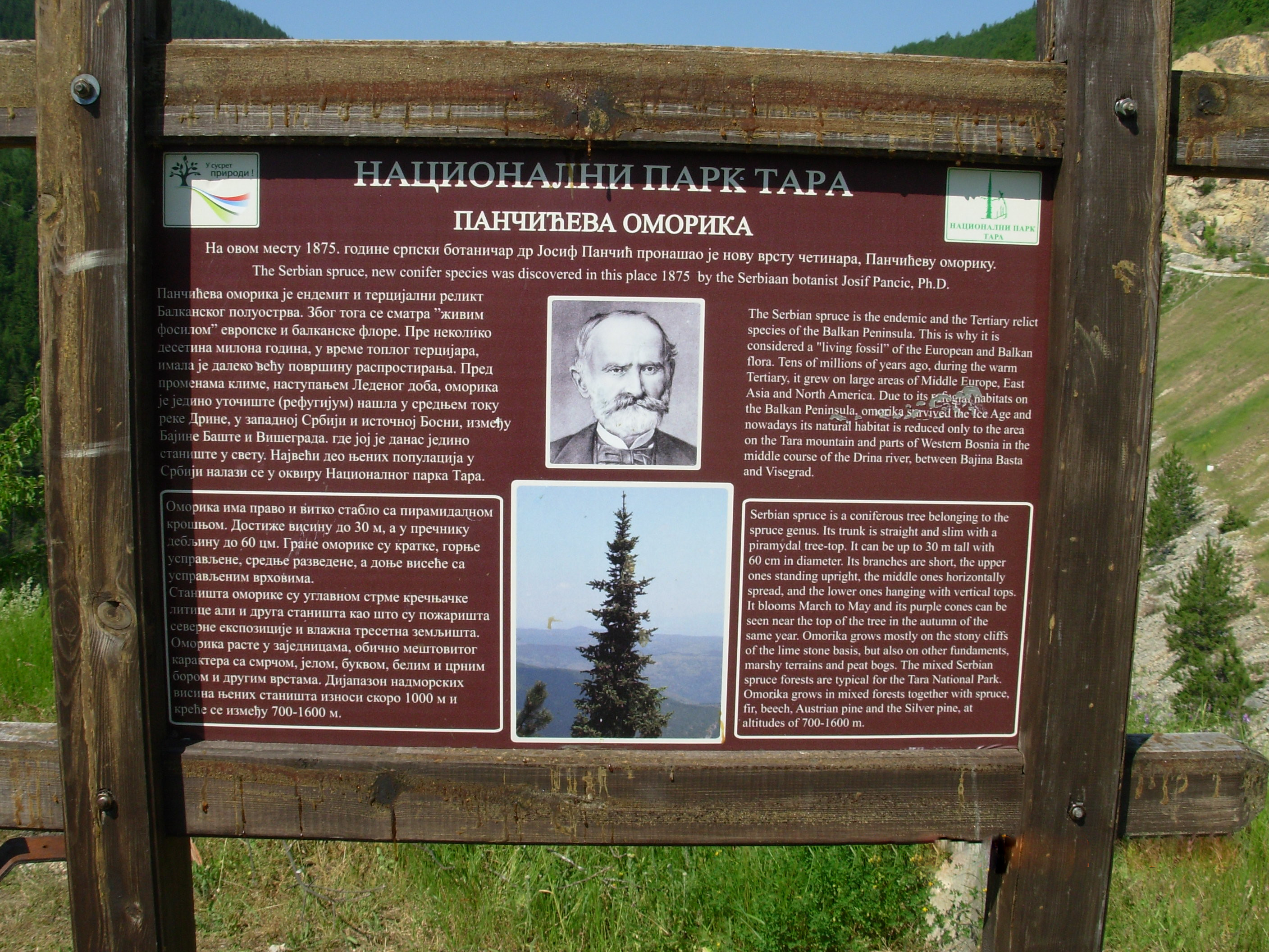 Табла о Панчићу и Панчићевој оморици на месту где је први пут пронађена. Насеље Ђурићи на брани Заовинског језера, планина Тара. Сликао Goldfinger